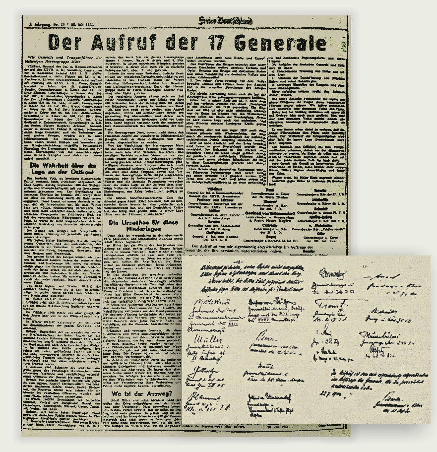 Die Zeitung Freies Deutschland vom 30. Juli 1944: Der Aufruf der 17 Generale